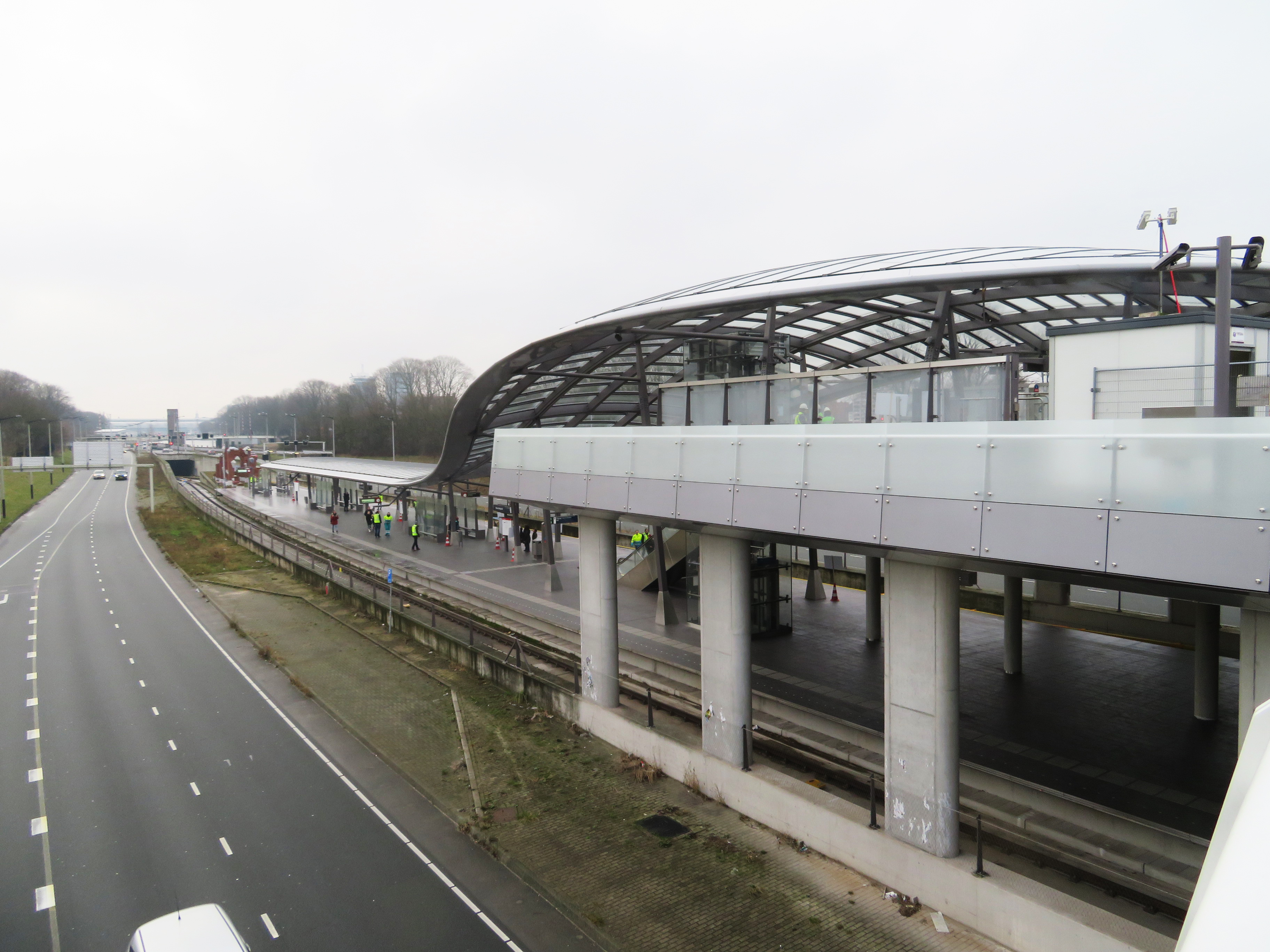 Metrostation Noorderpark Amsterdam